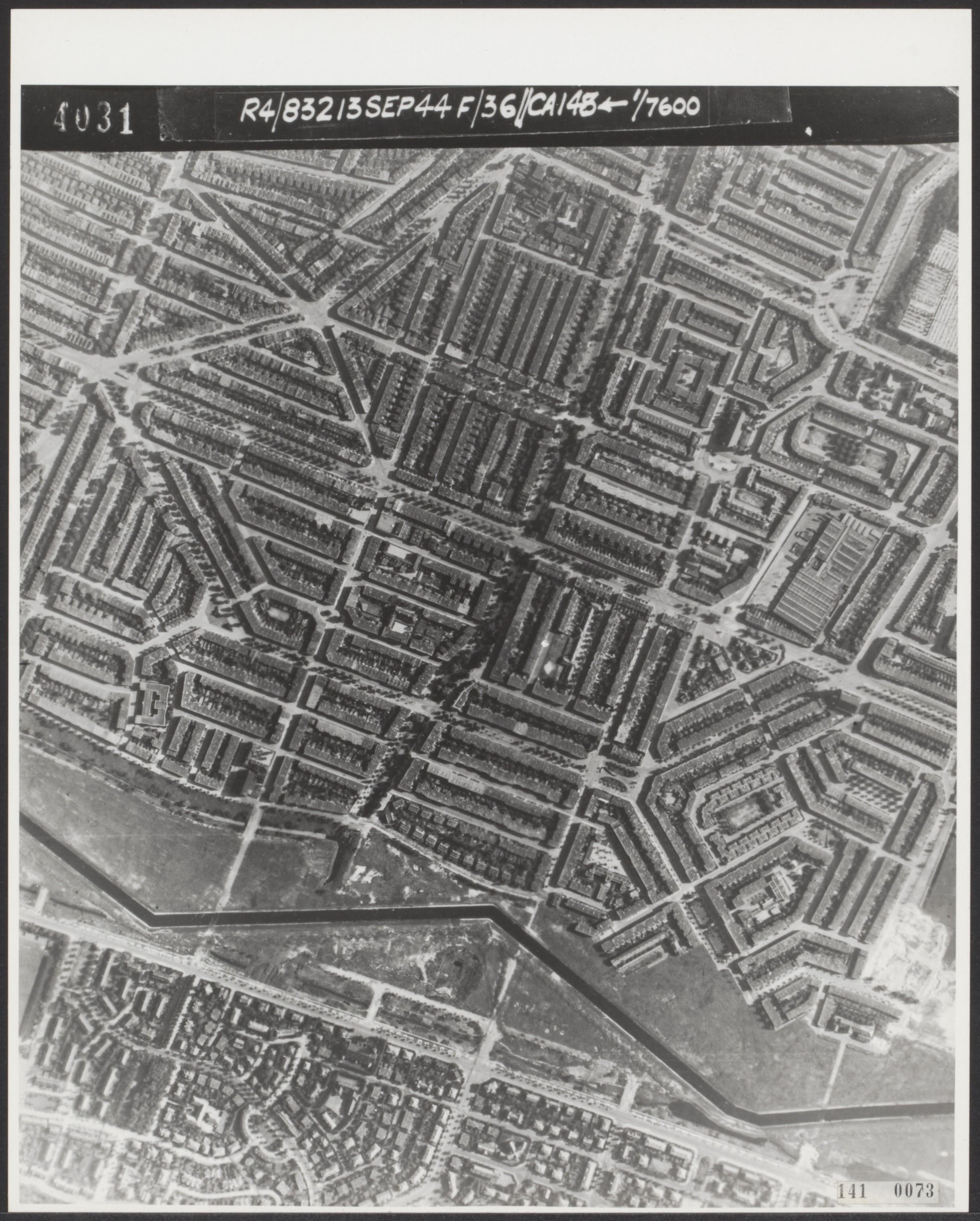 Luchtopname. Den Haag ontruimd. Om "hun" kust te verdedigen projecteren de bezetters een lange tankgracht [beneden in beeld] door de bebouwing van Den Haag en Scheveningen. Daar moet alles voor wijken, alles wat ligt in een 100 meter brede strook. De mensen moeten hun huizen en gebouwen ontruimen. Alles wordt afgebroken, en het graafwerk begint. Een restant van de tankgracht wordt na de oorlog een fraaie waterpartij in een plantsoen aan de Segbroeklaan